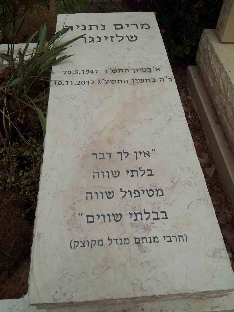 מצבה על קברה של מרים שלזינגר בבית העלמין מנוחה נכונה כפר סבא